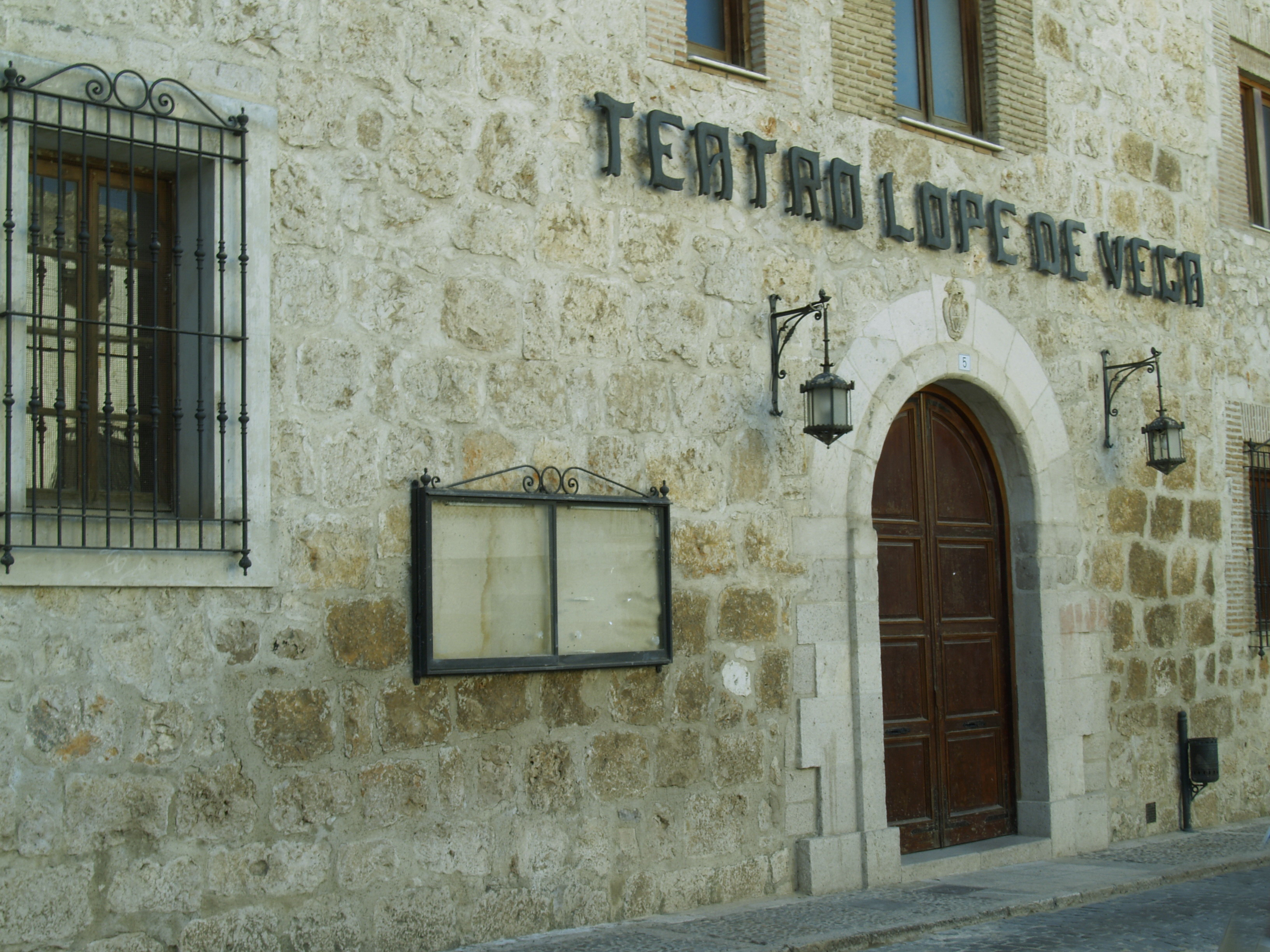 Hiszpania, Kastylia-La Mancha, Toledo, Stół Okani (Mesa de Ocańa), Ocańa, Teatr Lope de Vega